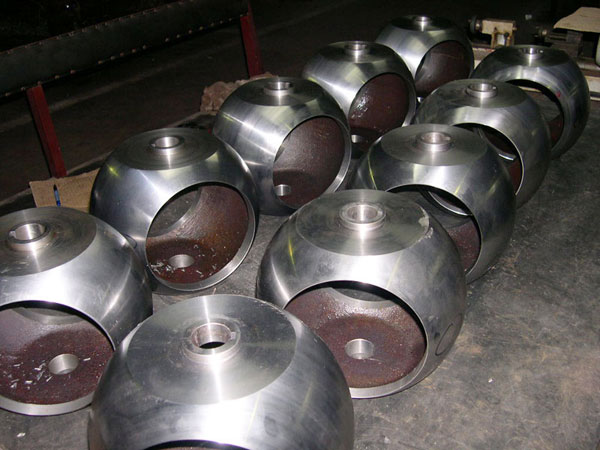 Balls for ball valves.